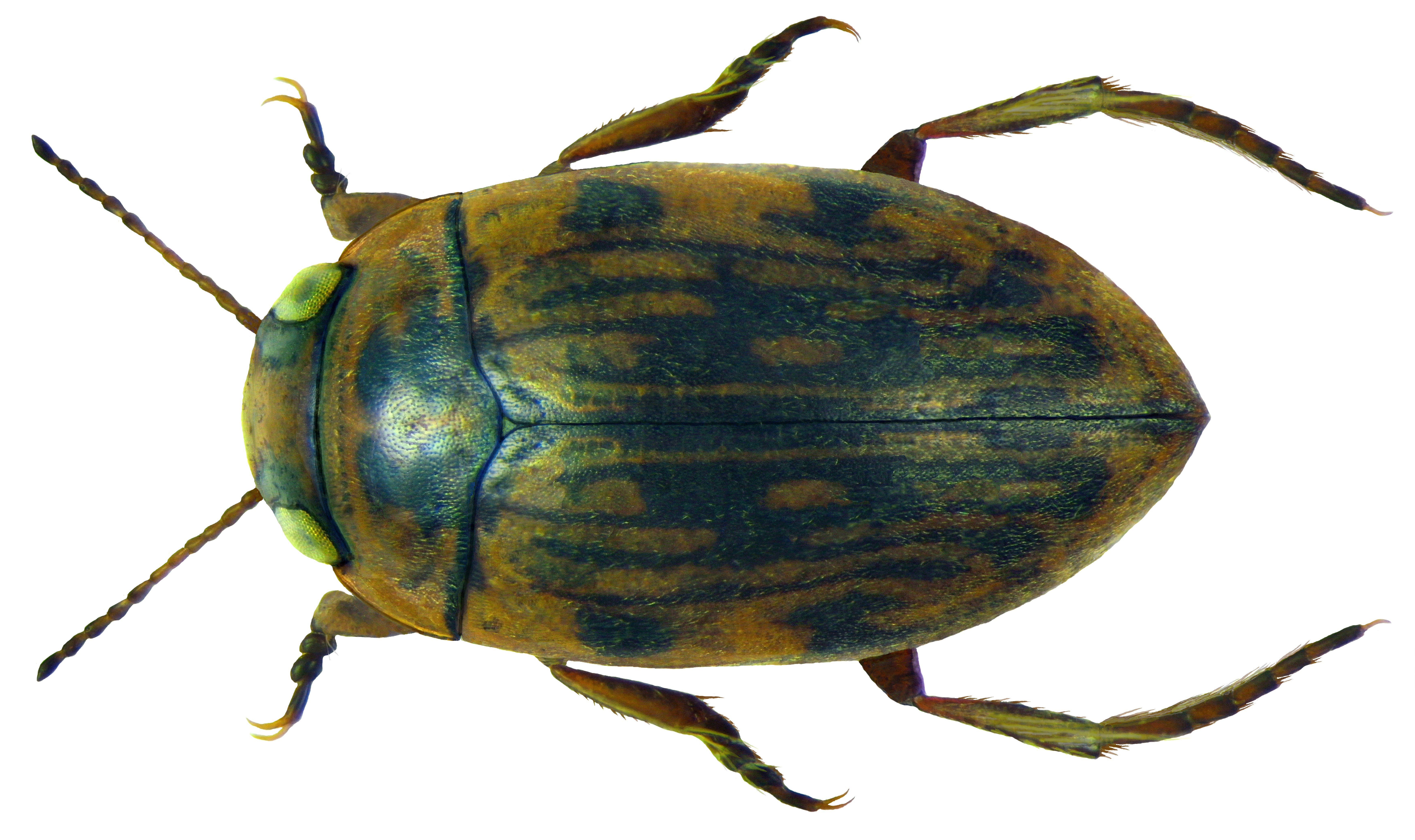 Scarodytes halensis (Fabricius, 1787). Familie: Dytiscidae Groesse: 4-4,5 mm Verbreitung: Europa Oekologie: in seichten Gewaessern auf Kies- und Lehmgrund Fundort: Bayern, Niederbayern, Straubing, Kiesgrube leg.det. U.Schmidt, 1975 Photo: U.Schmidt, 2011